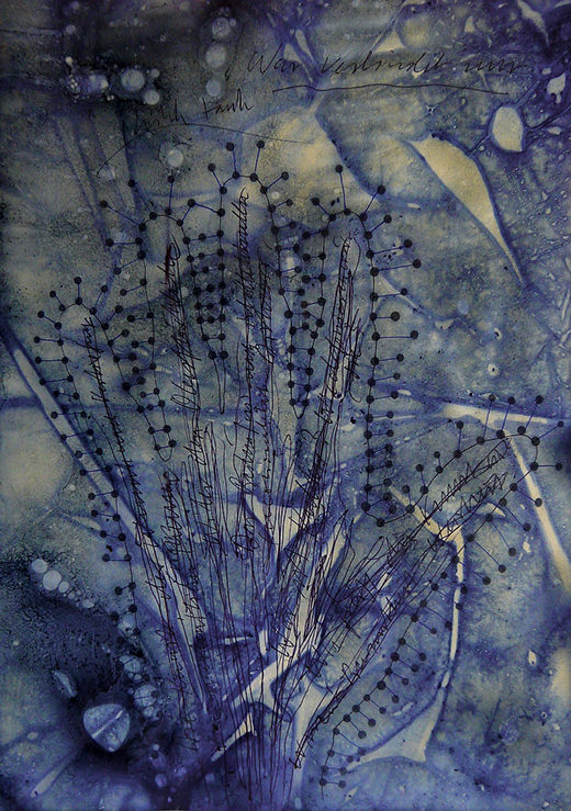 Series on Art and Environmental Ethics: Blueberry juice, brambleberry juice, antiseptic liquide, tempera with blueberry juice, ballpoint pen on paper. 21 x 29.7 cm